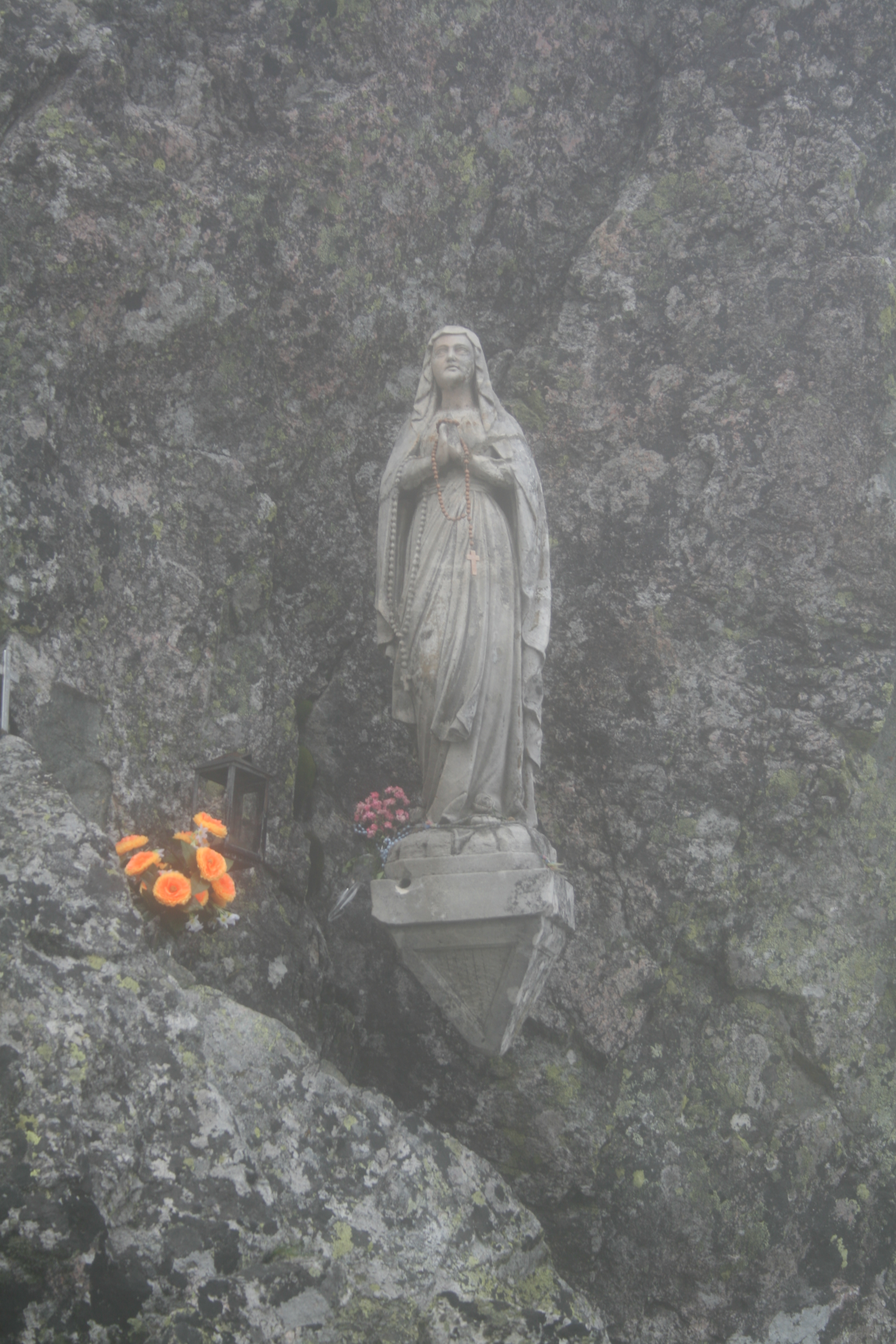 Zawratowa Pani